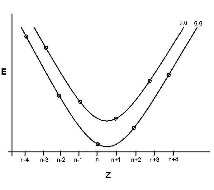 Diagramm zur Mattauchschen Isobarenregel